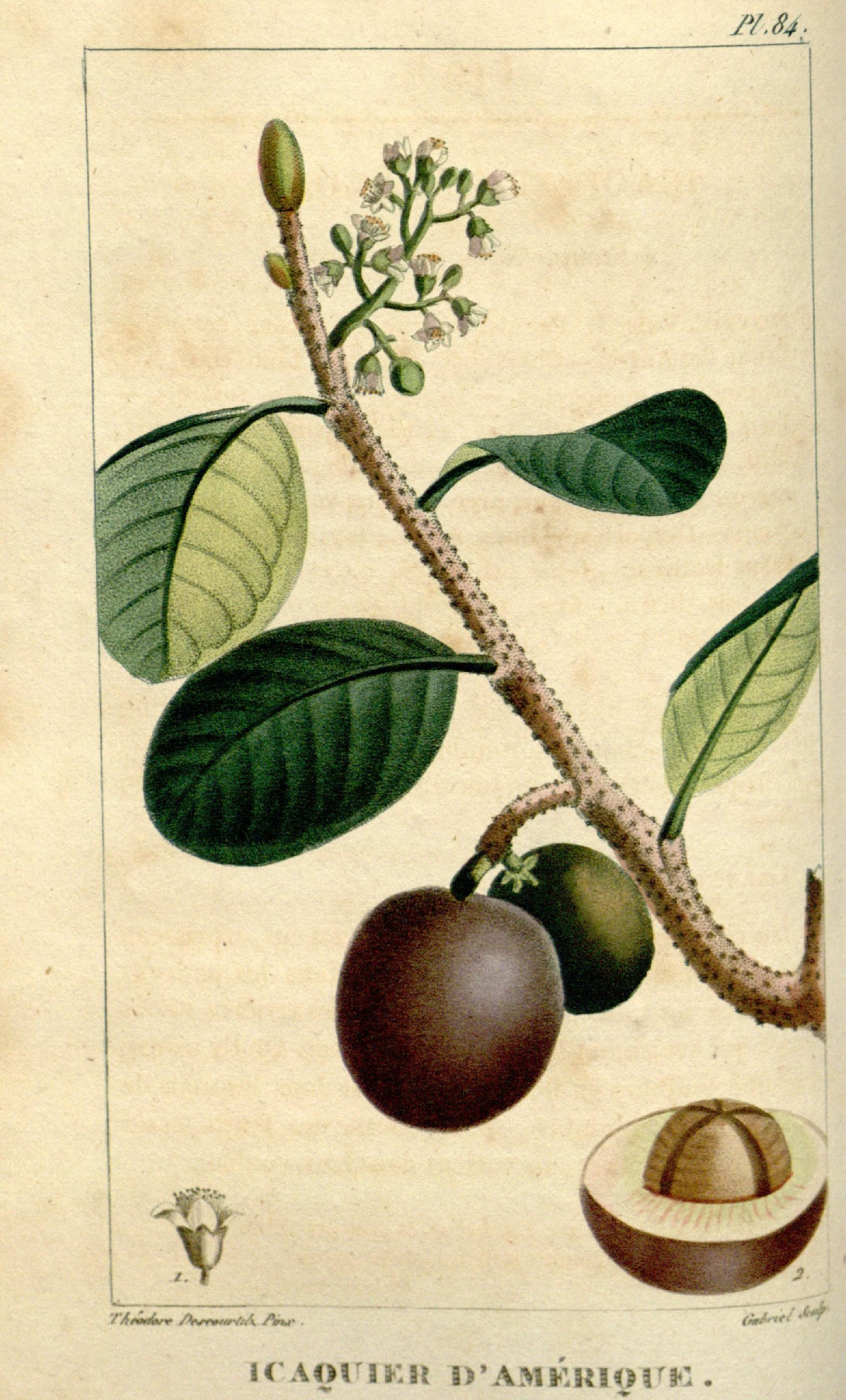 li. 84- T 4 mt6k i /Wvw^mV^^ /W lA-Mrr*' ^ îCAOriKH I.'AMKR101^K.